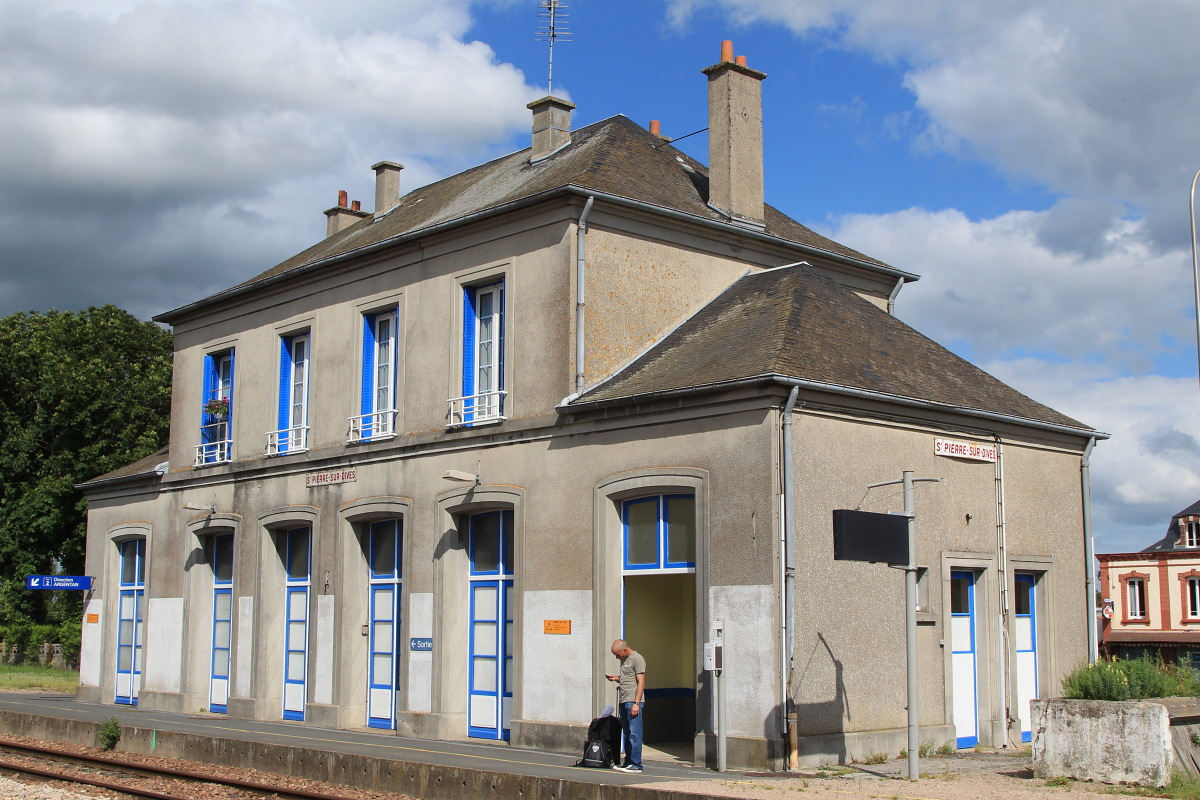 Ancien bâtiment voyageurs de la gare de Saint-Pierre-sur-Dives (Calvados) vu côté quais.